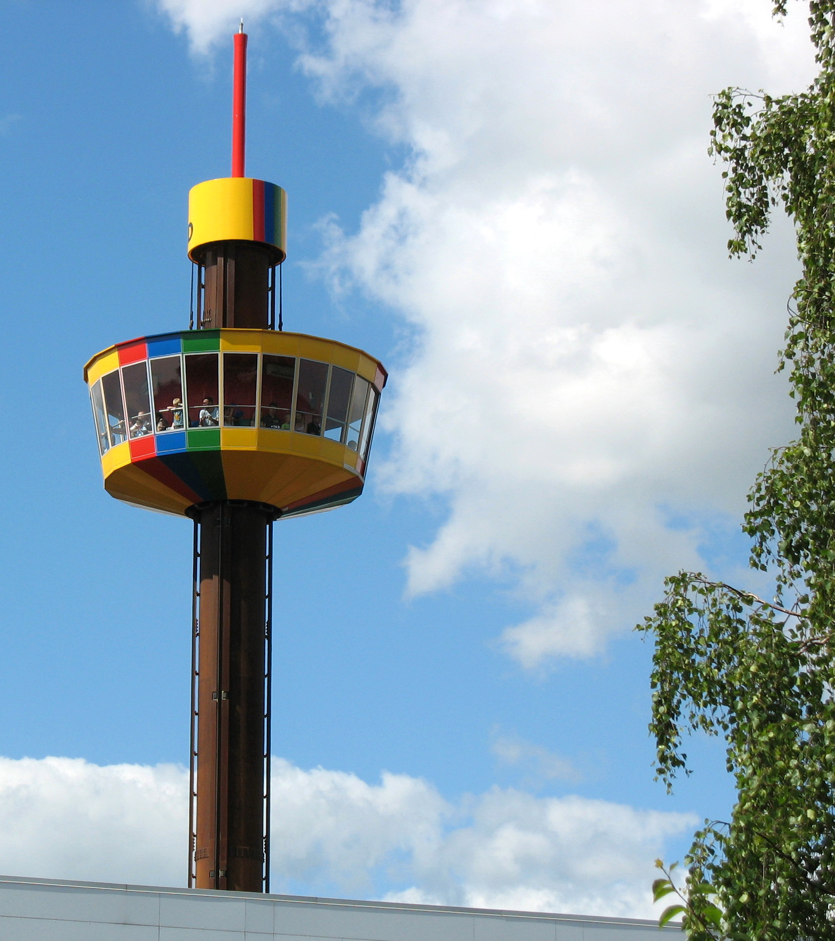 Billund - Legolands udsigtstårn